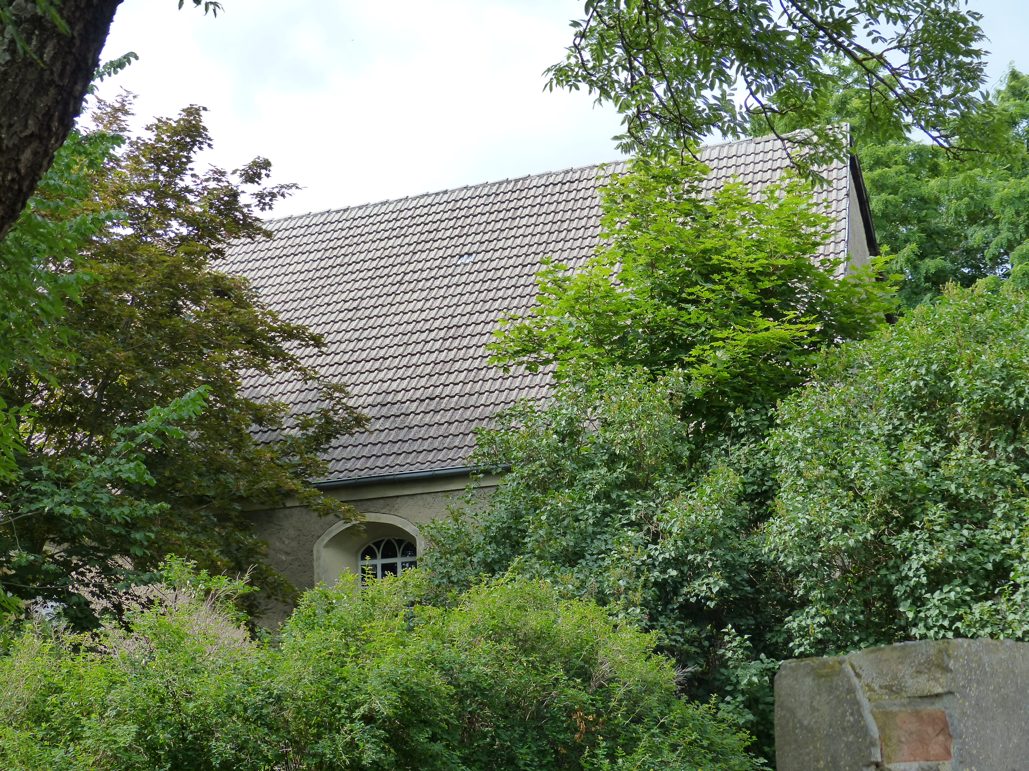 Kirche Altwigshagen, Blick von der Straße zur Südseite der Kirche